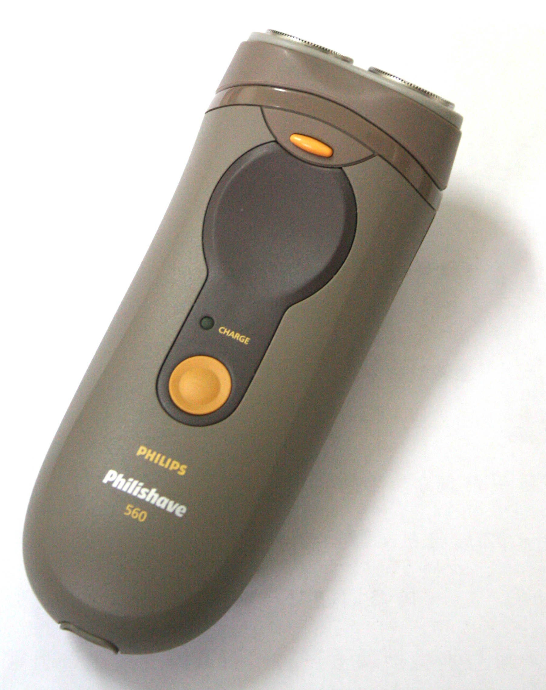 飛利浦生產的電動刮鬍刀 攝影: Weihao.chiu